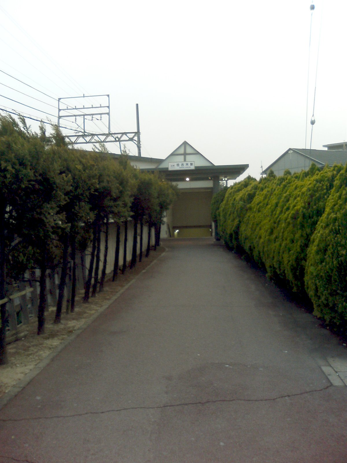 2007年4月2日、投稿者本人が撮影。